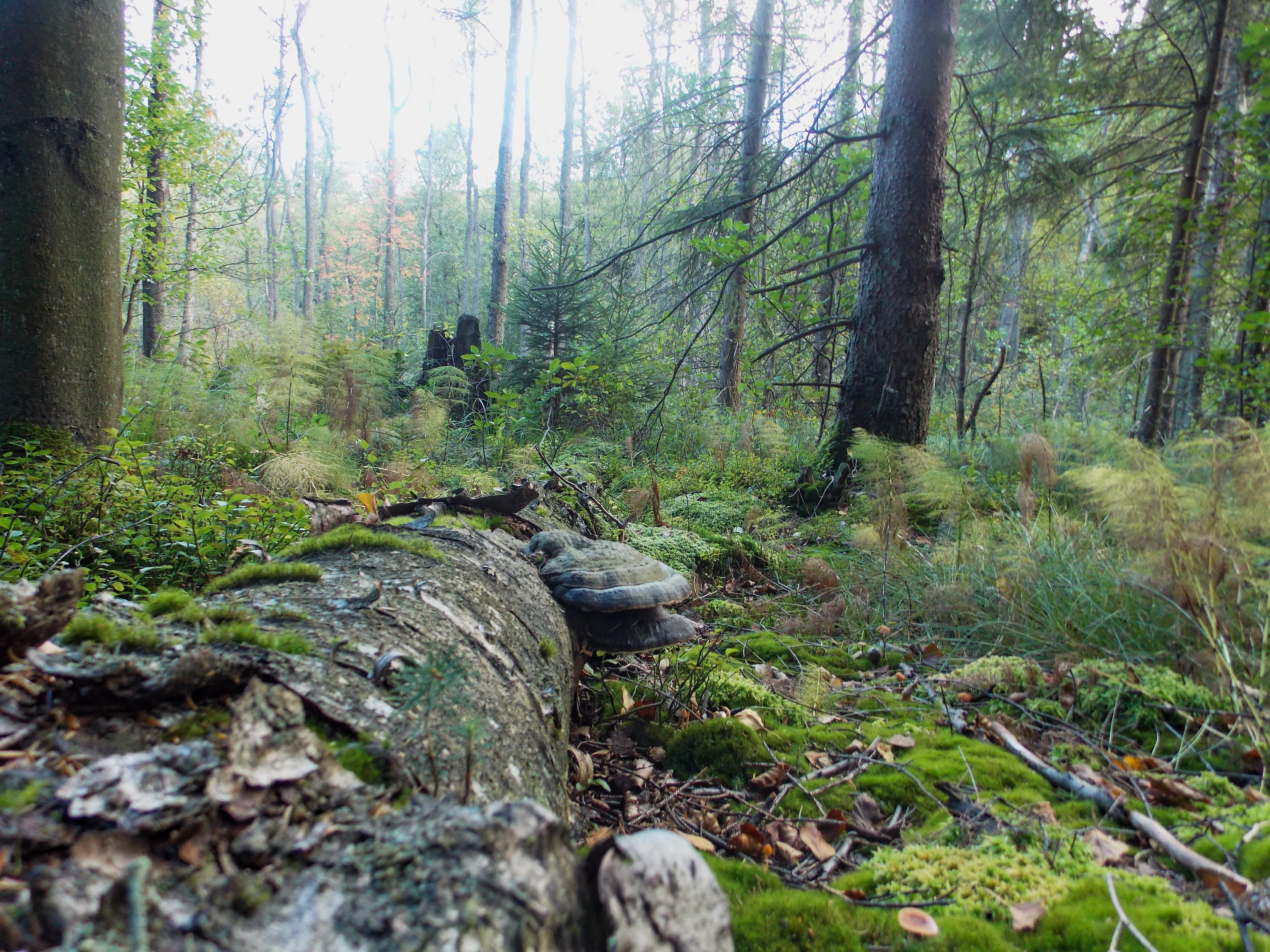 NSG Buchen- und Bruchwälder bei Einsiedelei und Apollmicke (Kreis Olpe, NRW)